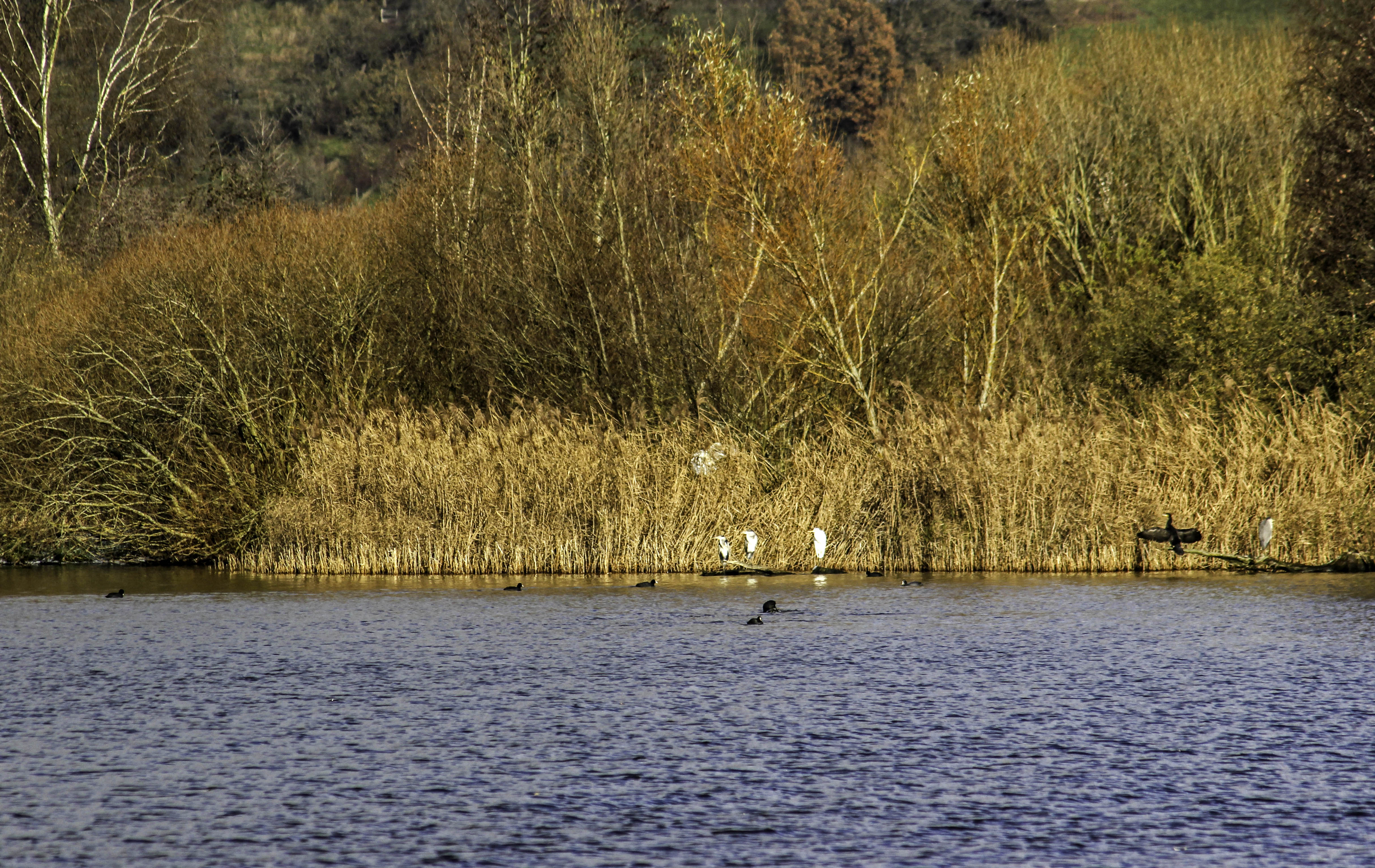 Kleiner Brombachsee, Naturschutzgebiet Halbinsel im Kleinen Brombachsee